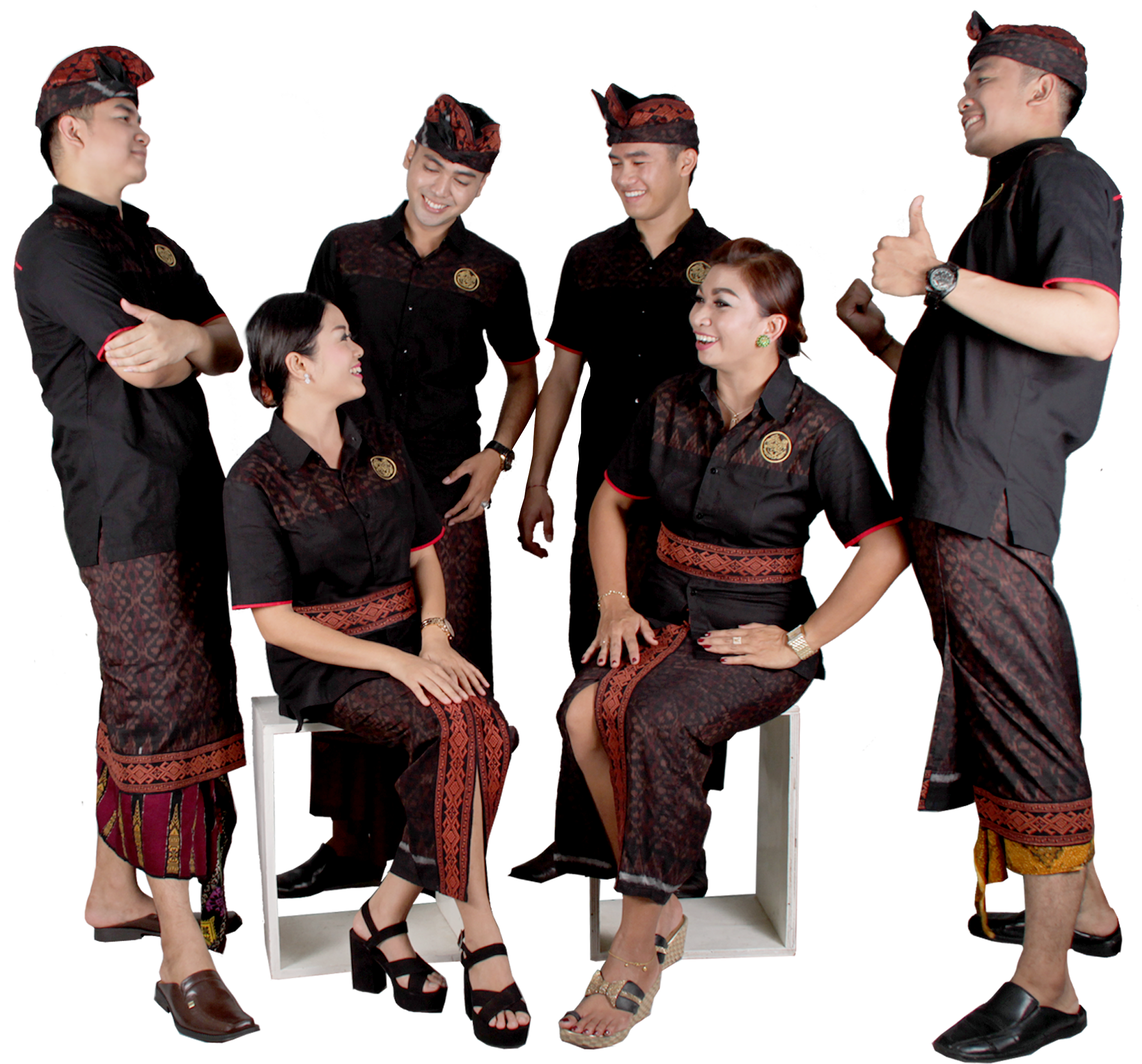 Para Tim Inti adalah tim yang membantu memaksimalkan standar dan kualitas setiap sisi dari acara teruna teruni bali. Tim inti diambil dari lulusan terbaik yang telah memahami penuh tentang sejarah, visi dan misi, serta telah memiliki kontribusi tinggi dalam menjaga dan meningkatkan kualitas dan nama baik teruna teruni bali.